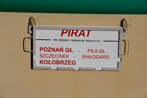 Tabliczka pociągu Pirat pod parą